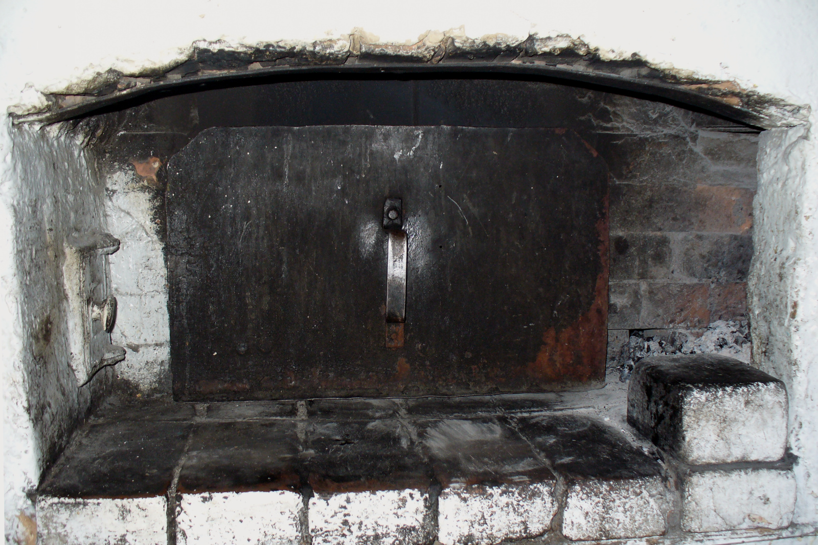 Топка русской печи, закрытая заслонкой